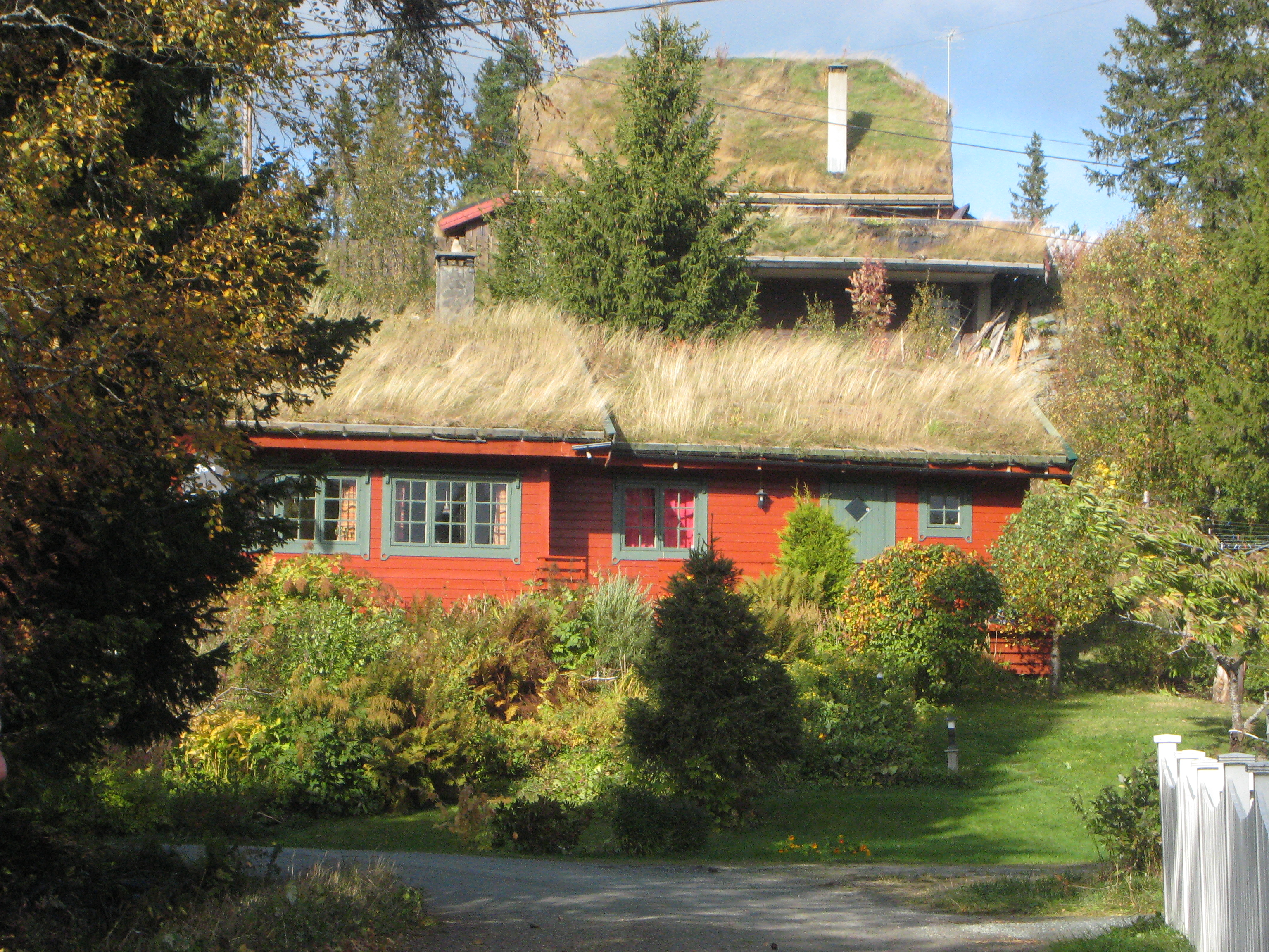 Zdjęcie domu